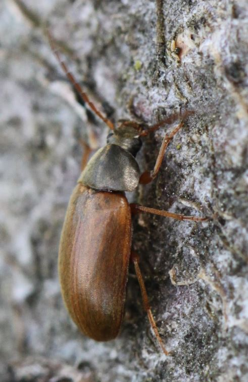 Isomira cf. murina am 3.6.2017 in der Schwetzinger Hardt